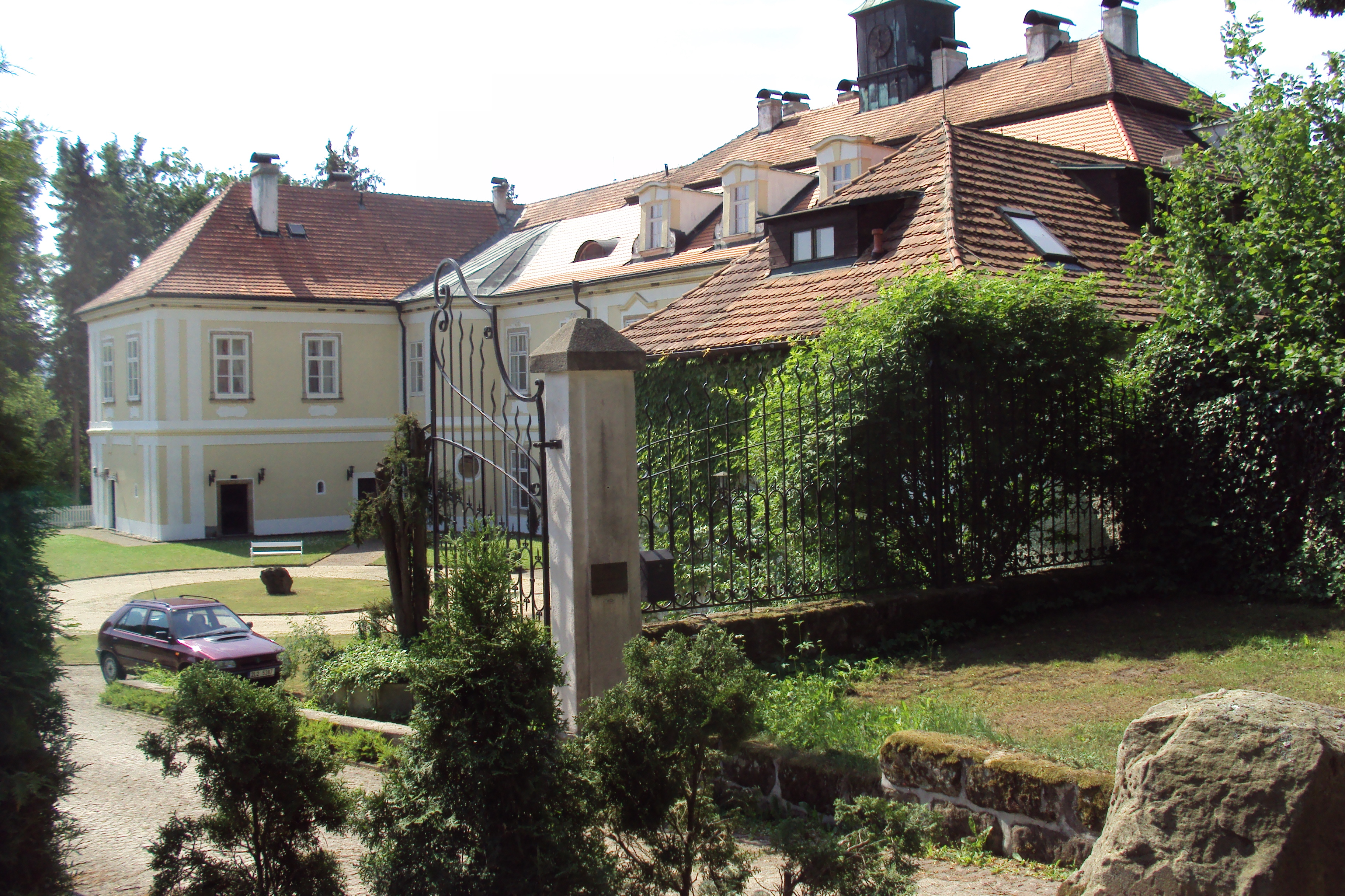 Zámek je ve stejnojmenné části města Dubá